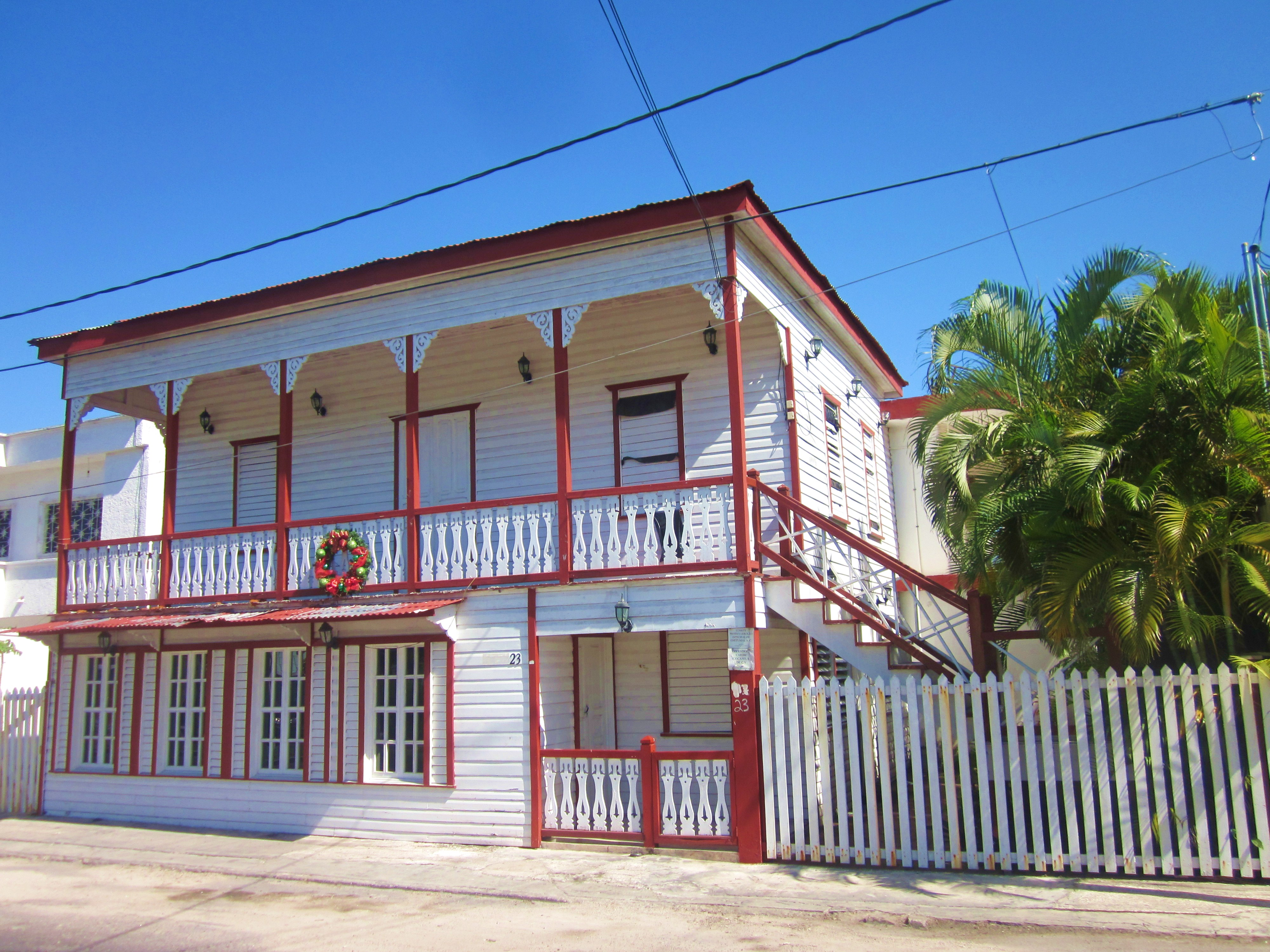 Casa, Calzada Veracruz casi esquina B. Bahía, Chetumal, Q. Roo.